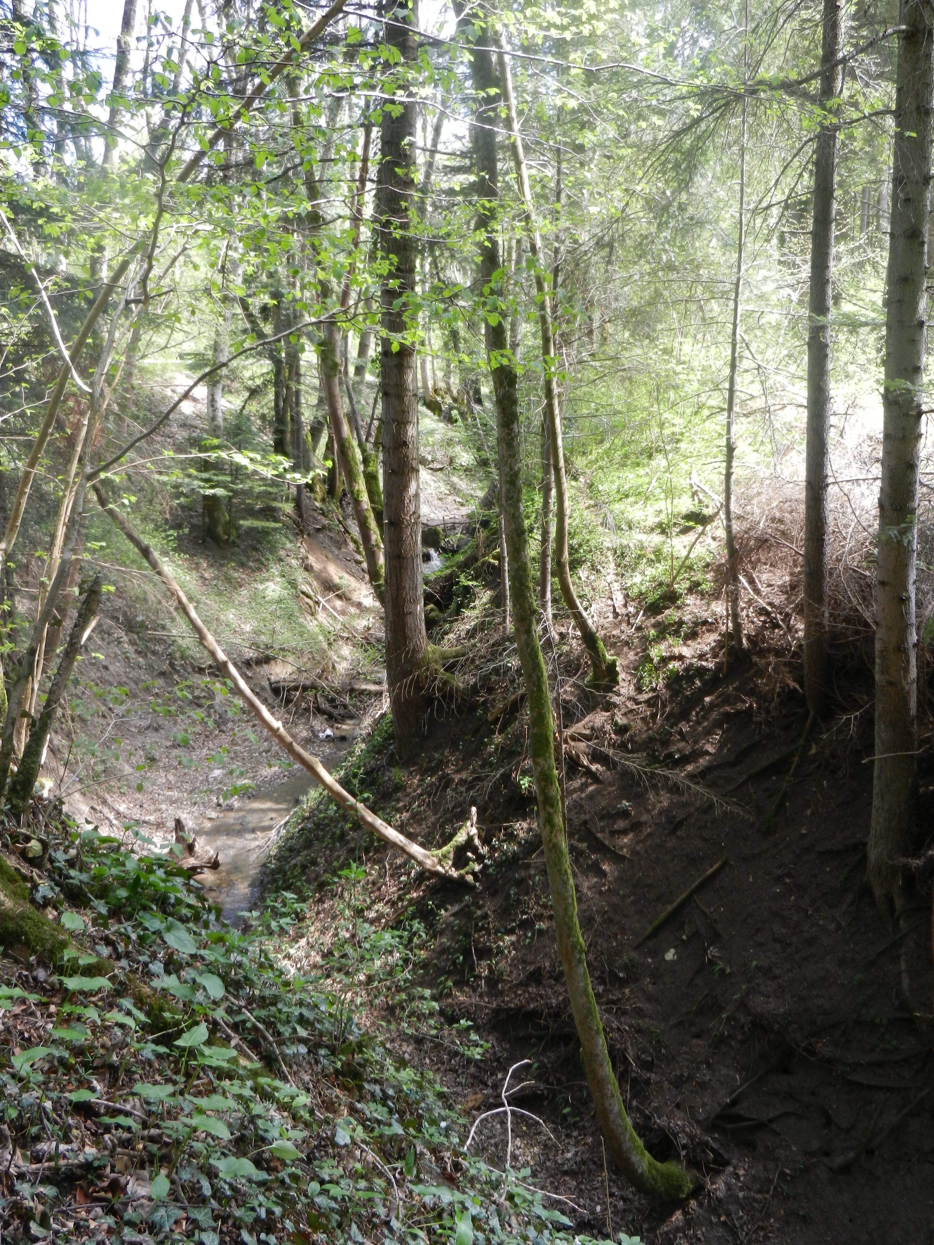 Weidenbach oberhalb Zimmern